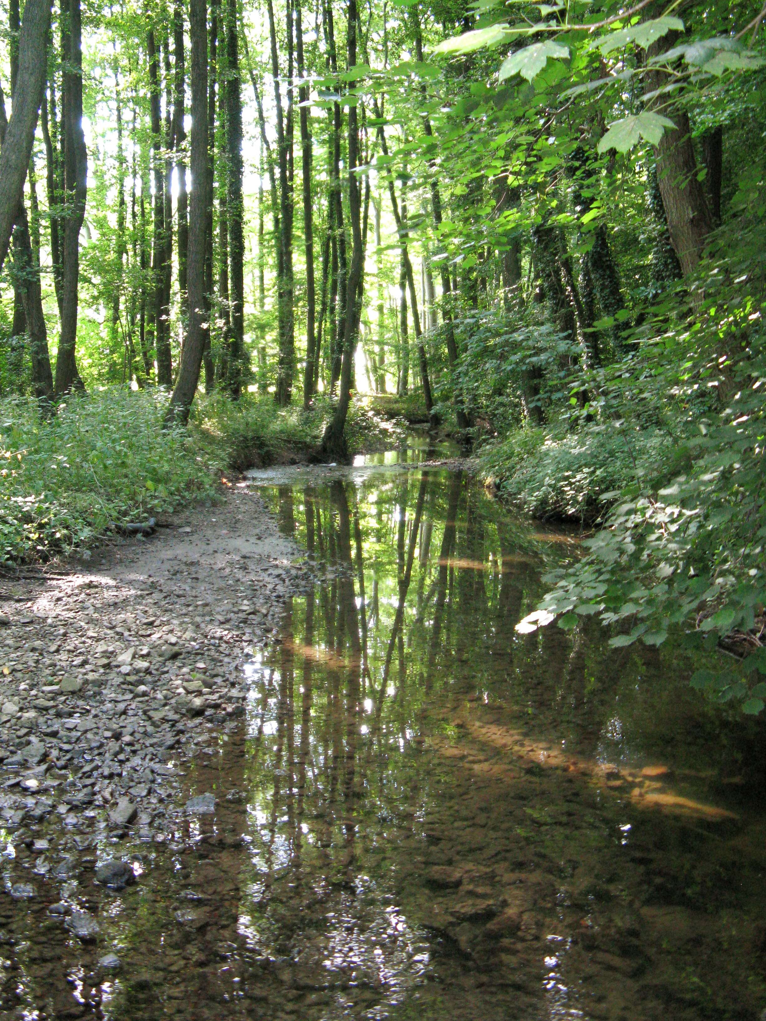 Der obere Oetternbach im Naturschutzgebiet „Oetternbach“, Kreis Lippe